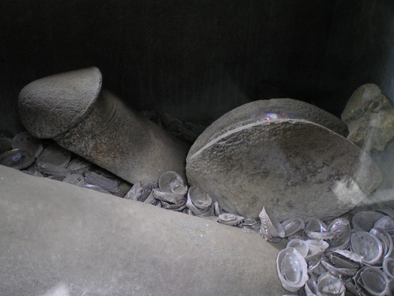 雄岡山 雄岡神社 ご神体